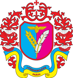 Герб Гребінківського району